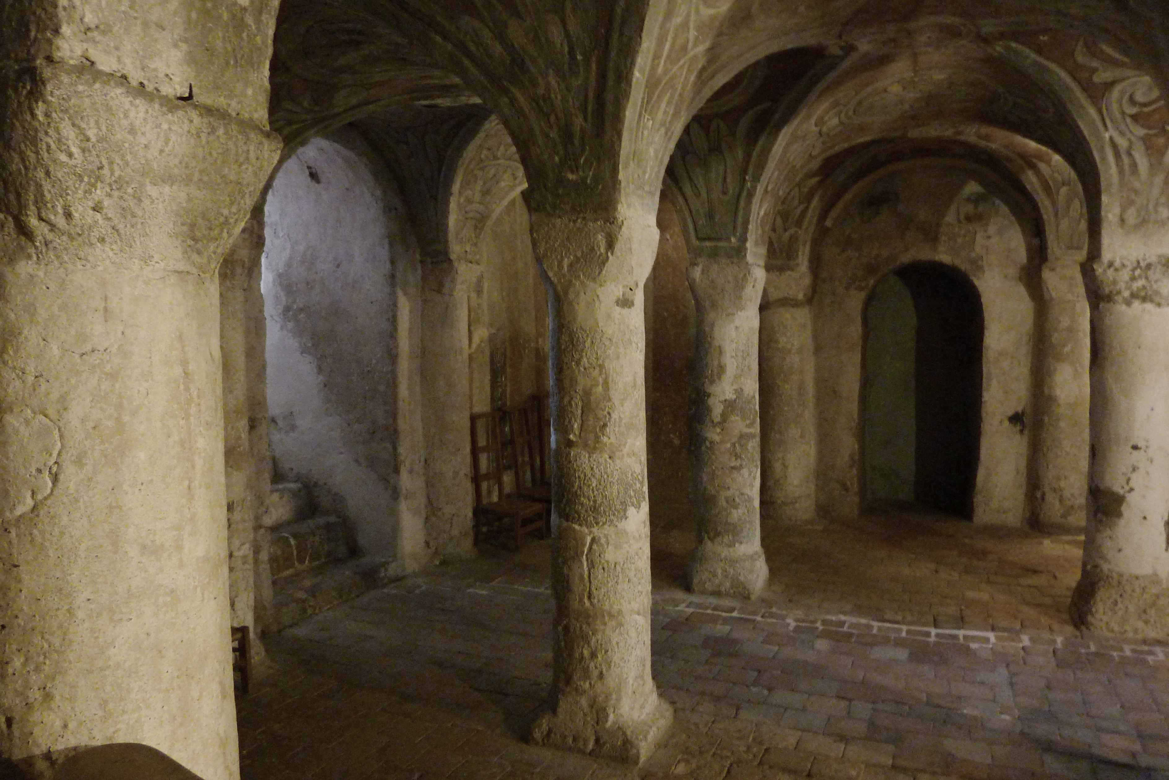 Katholische Pfarrkirche Notre-Dame-du-Fort in Étampes im Département Essonne in der Region Île-de-France (Frankreich), Krypta aus dem 11. Jahrhundert Object location48° 26′ 05.89″ N, 2° 09′ 51.01″ E